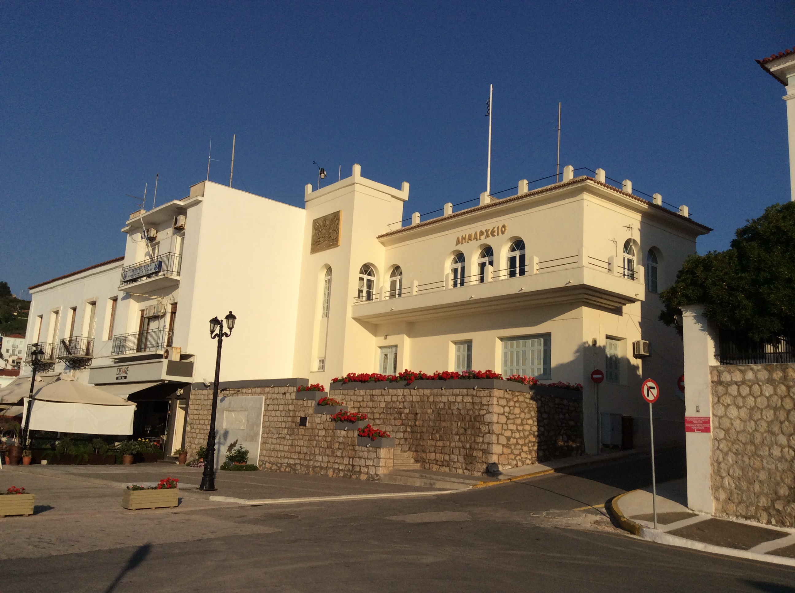 Πύλος - Το Δημαρχείο Πύλου - Νέστορος.